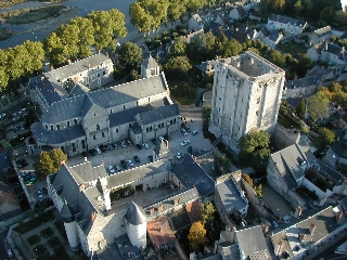 El castillo de Beaugency, hoy. Compárese la torre cuadrada (arriba a la derecha) con el dibujo antiguo que encabeza este artículo. Castillo de Beaugency fotografiado desde un globo, licencia desde la wikipedia francesa, por Marc Liger en 11 octubre 2003. Muchas Gracias Marc!